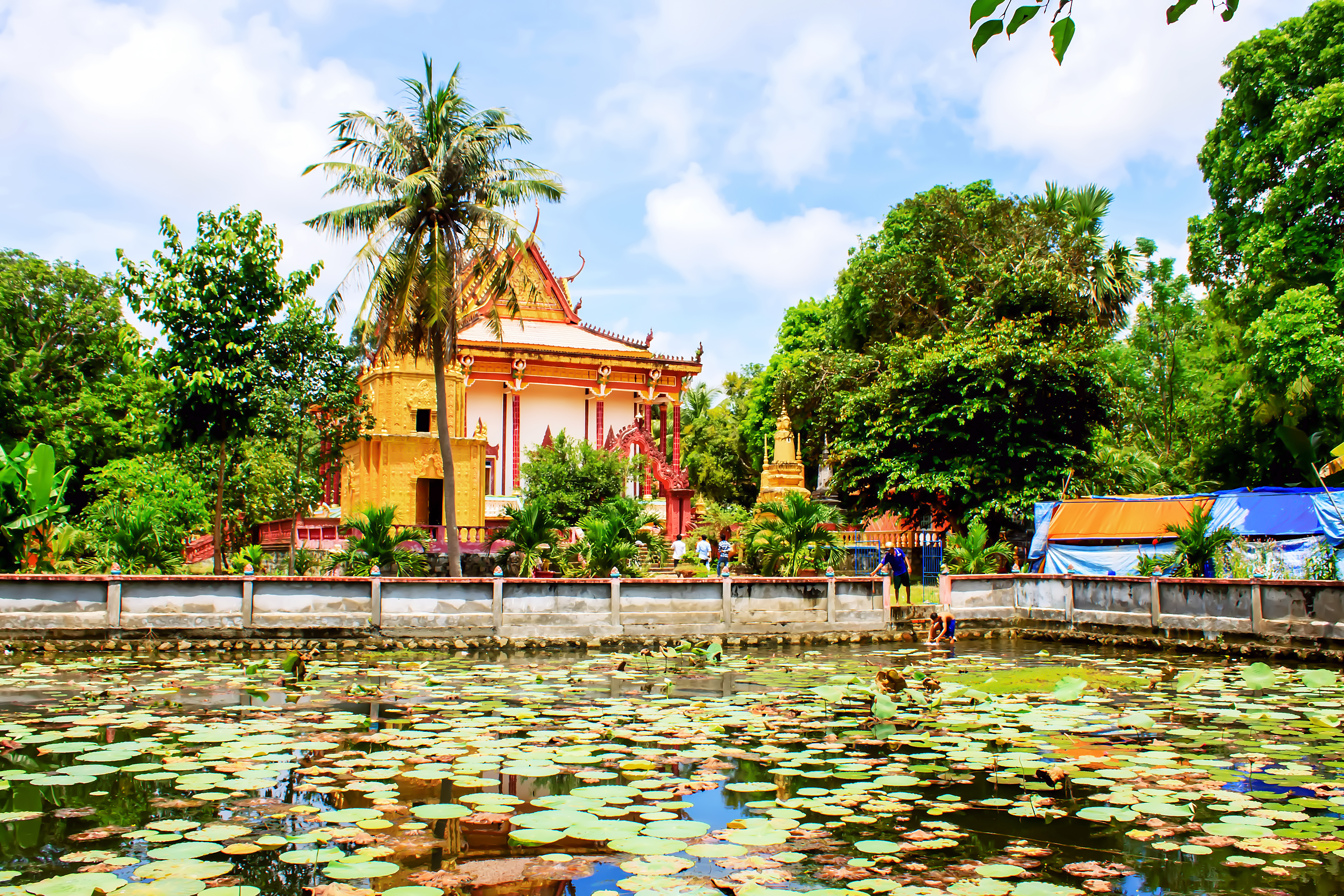 Chùa Tà Miệt của tộc người Khmer ở Lương Phi, thuộc huyện Tri Tôn, An Giang, Việt Nam.